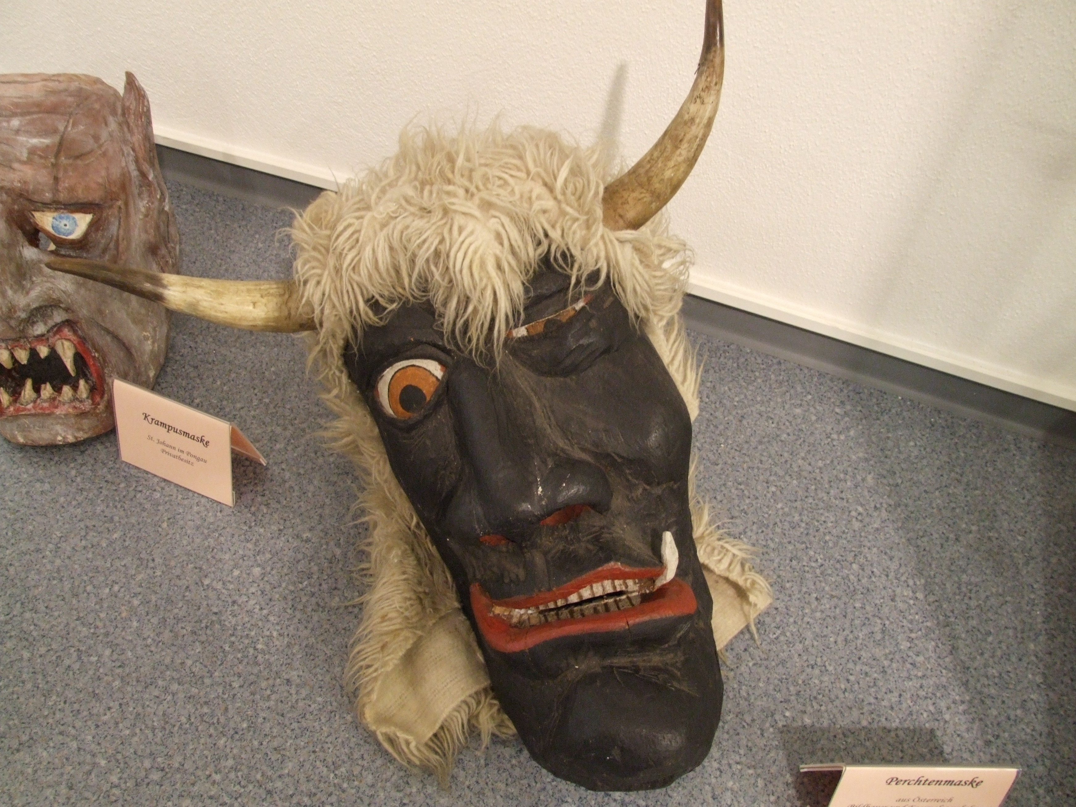 Perchtenmaske aus Österreich eines unbekannten Bildhauers und Faßmalers um 1920, heute im Besitz der Alemanischen Larvenfreunde Endingen, aufgenommen bei der Jubiläumsausstellung des Fasnachtsmuseums Speyer